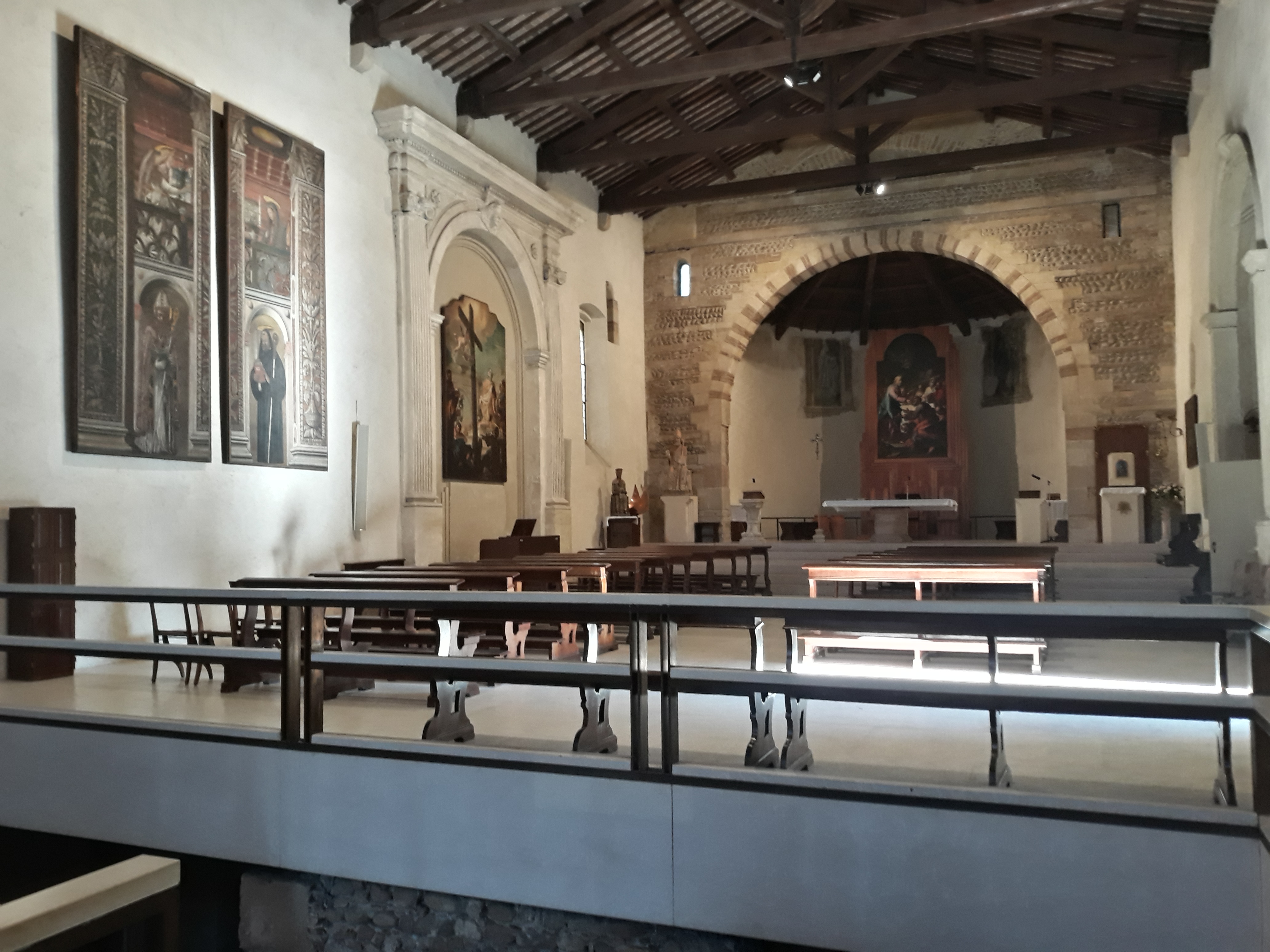 Interno della chiesa di San Procolo a Verona